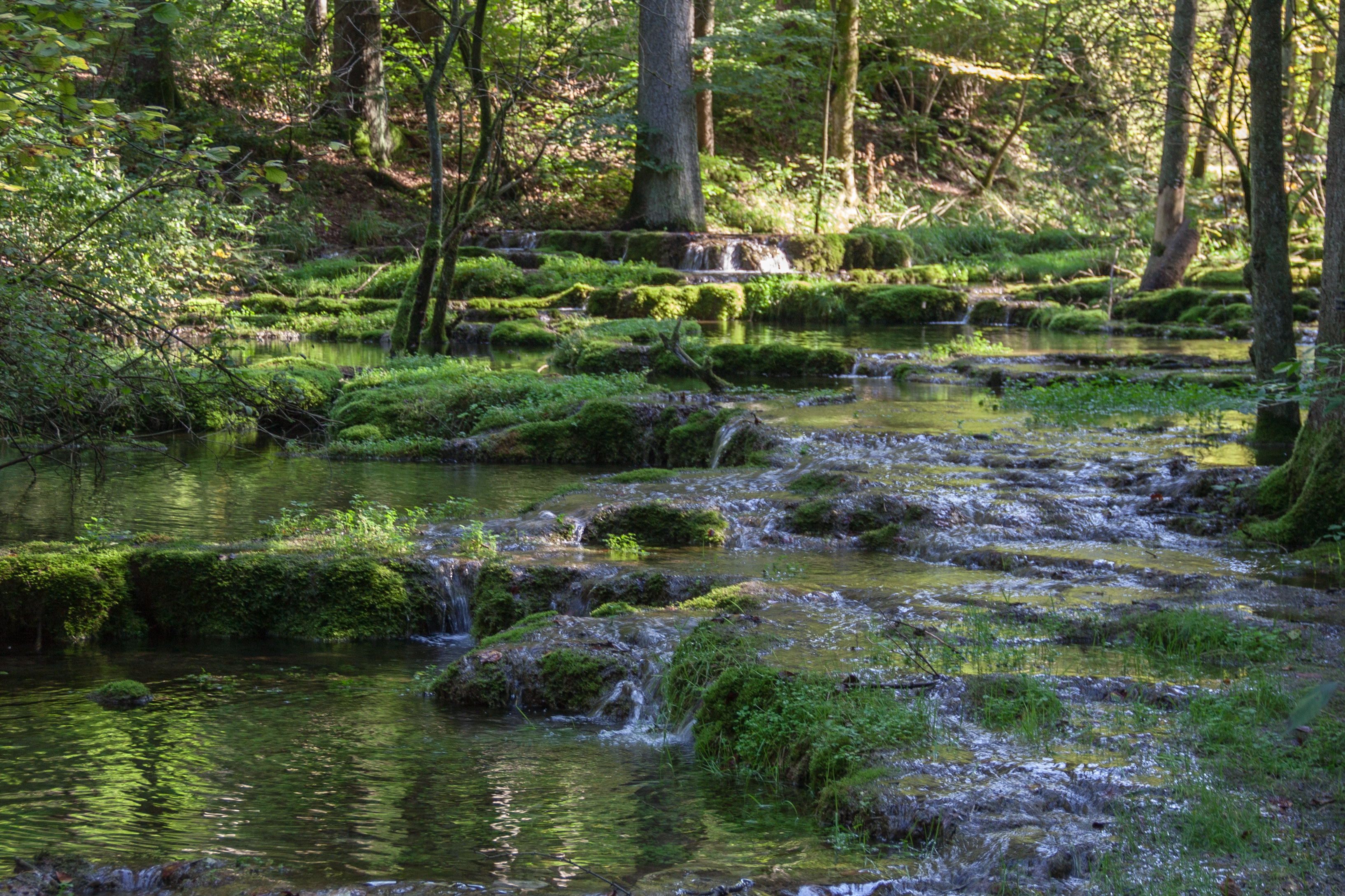 Kaisinger Tal, Sinterterrassen